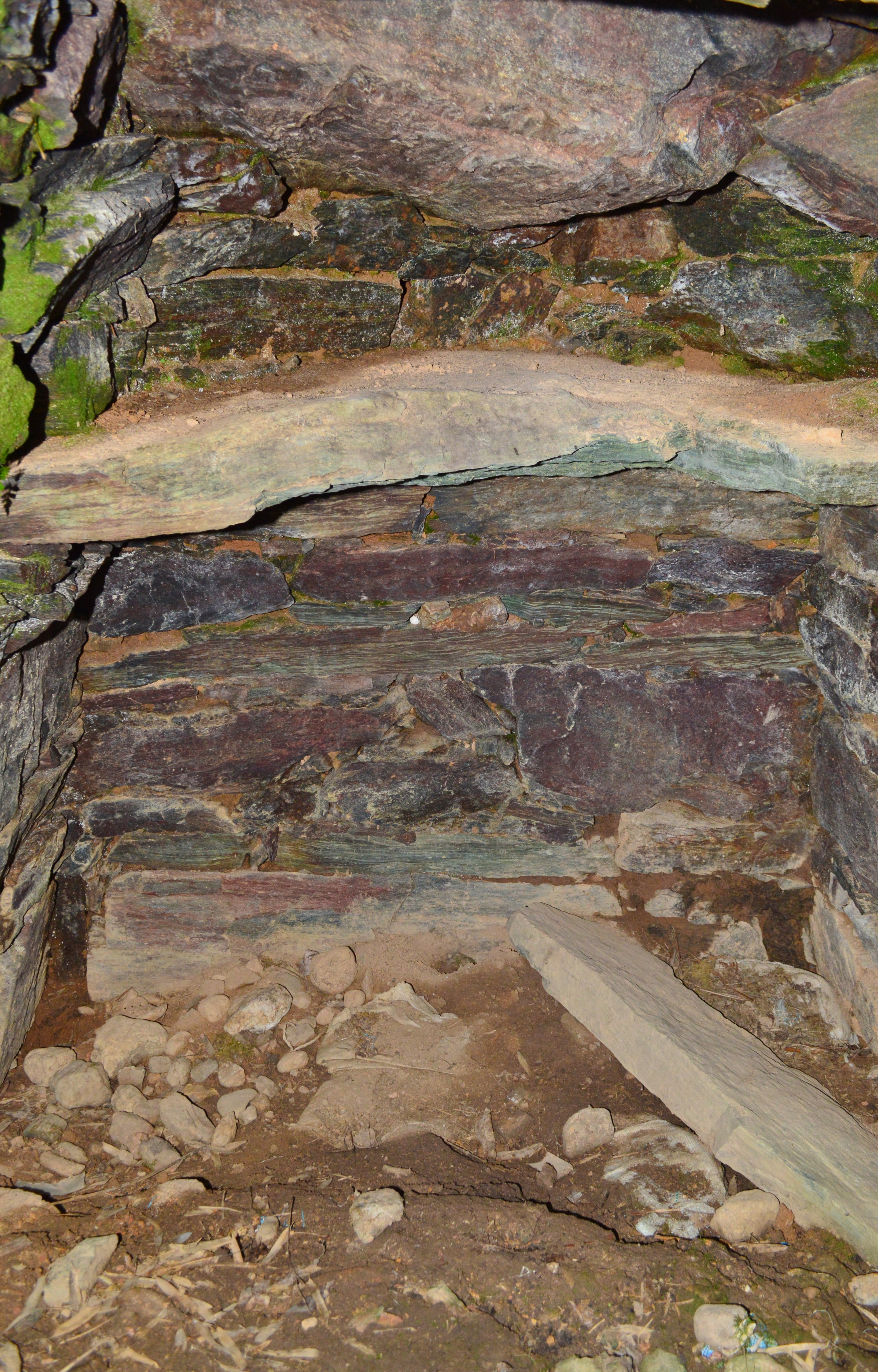 槇ヶ峯1号墳 石室玄室